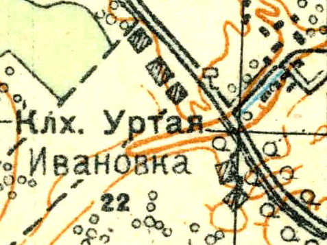 Топографическая карта Ленинградской области, квадрат О-35-24-Б-б (Колхоз Туганицы), деревня Ивановка